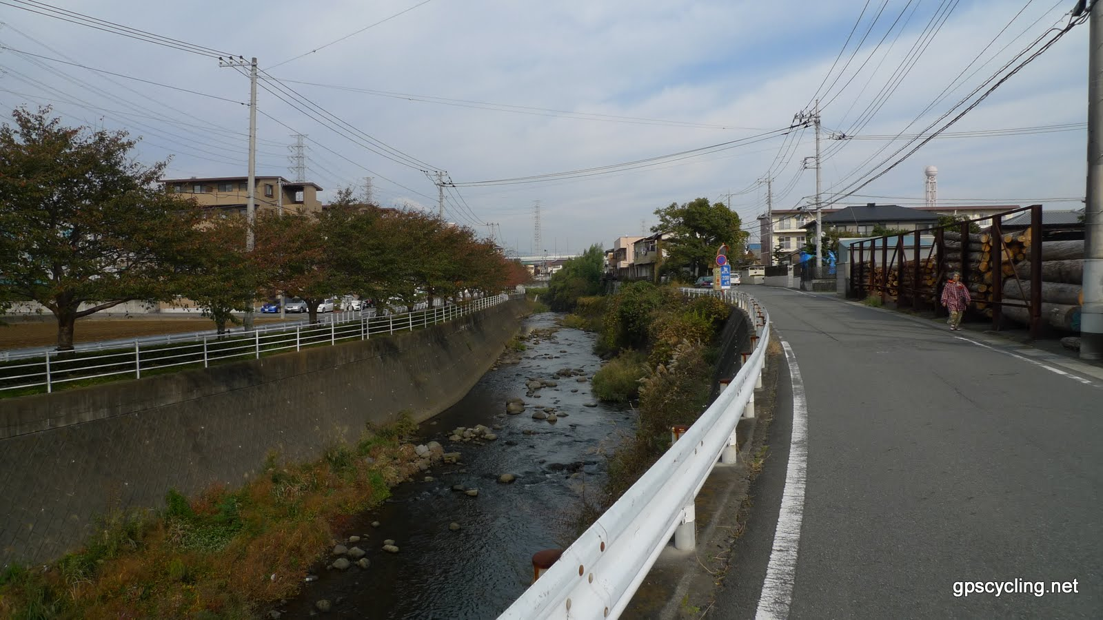 大場川